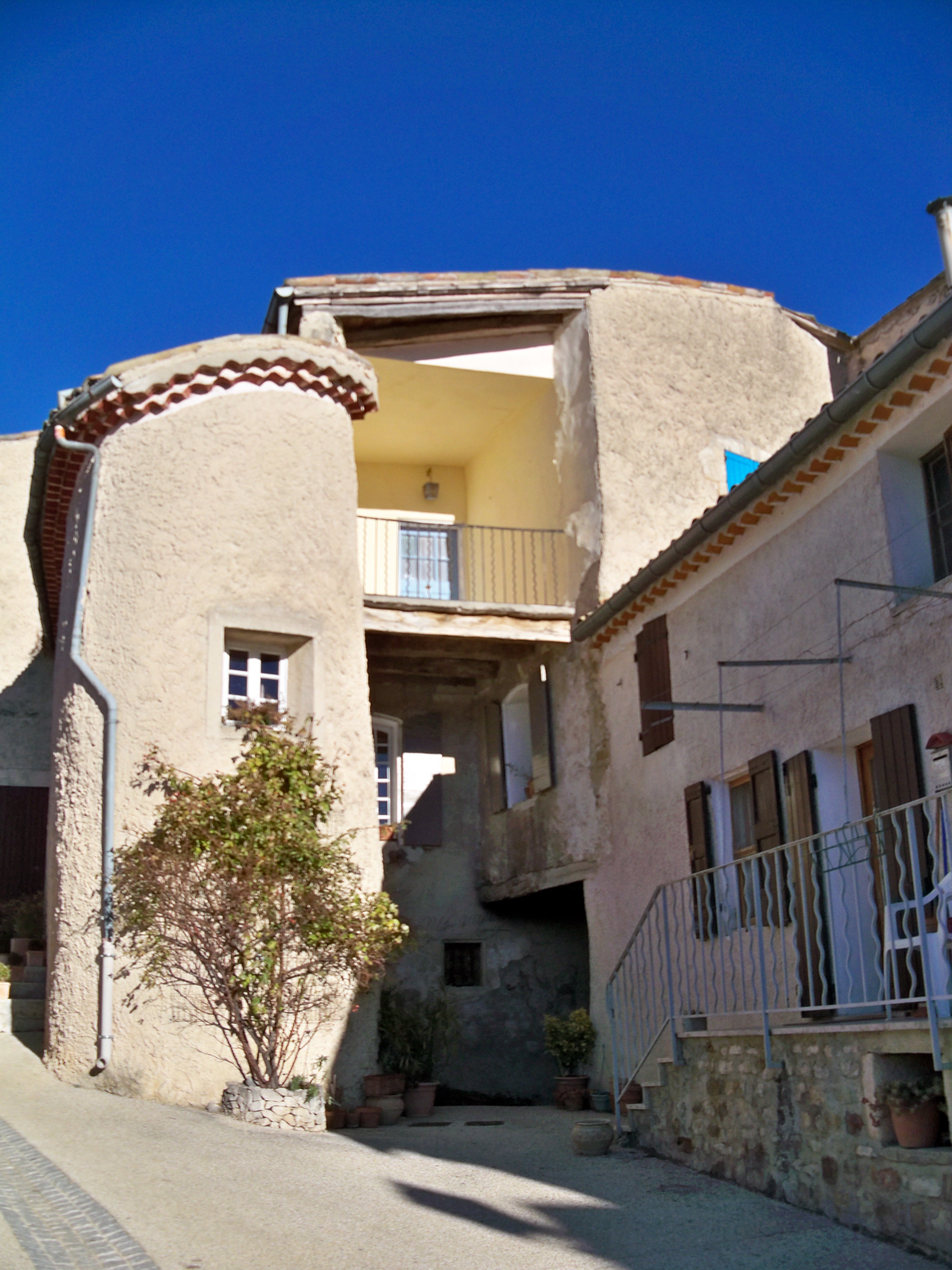 Maison à Tour à Aurel (Vaucluse)